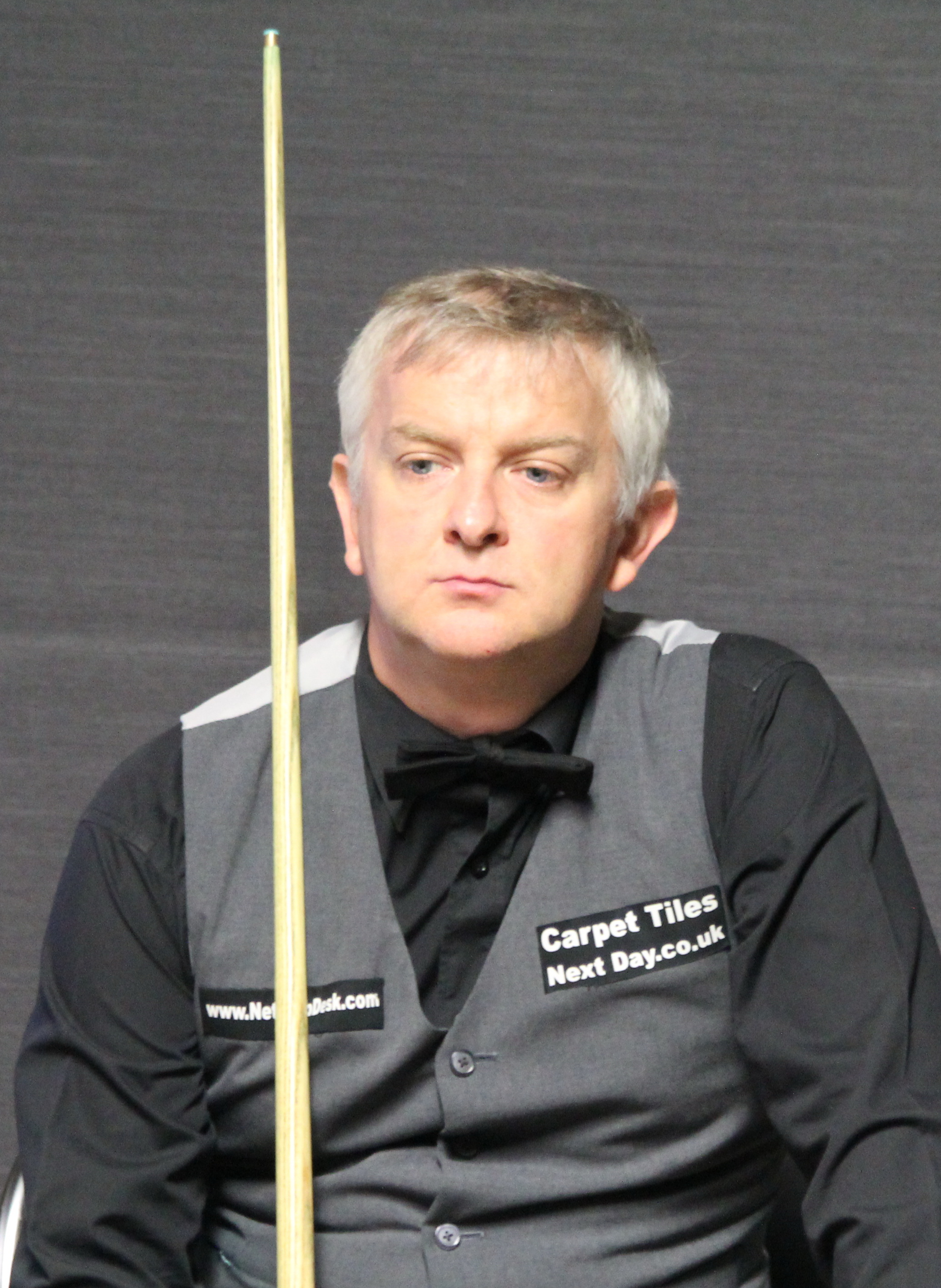 Barry Pinches beim Paul Hunter Classic 2016